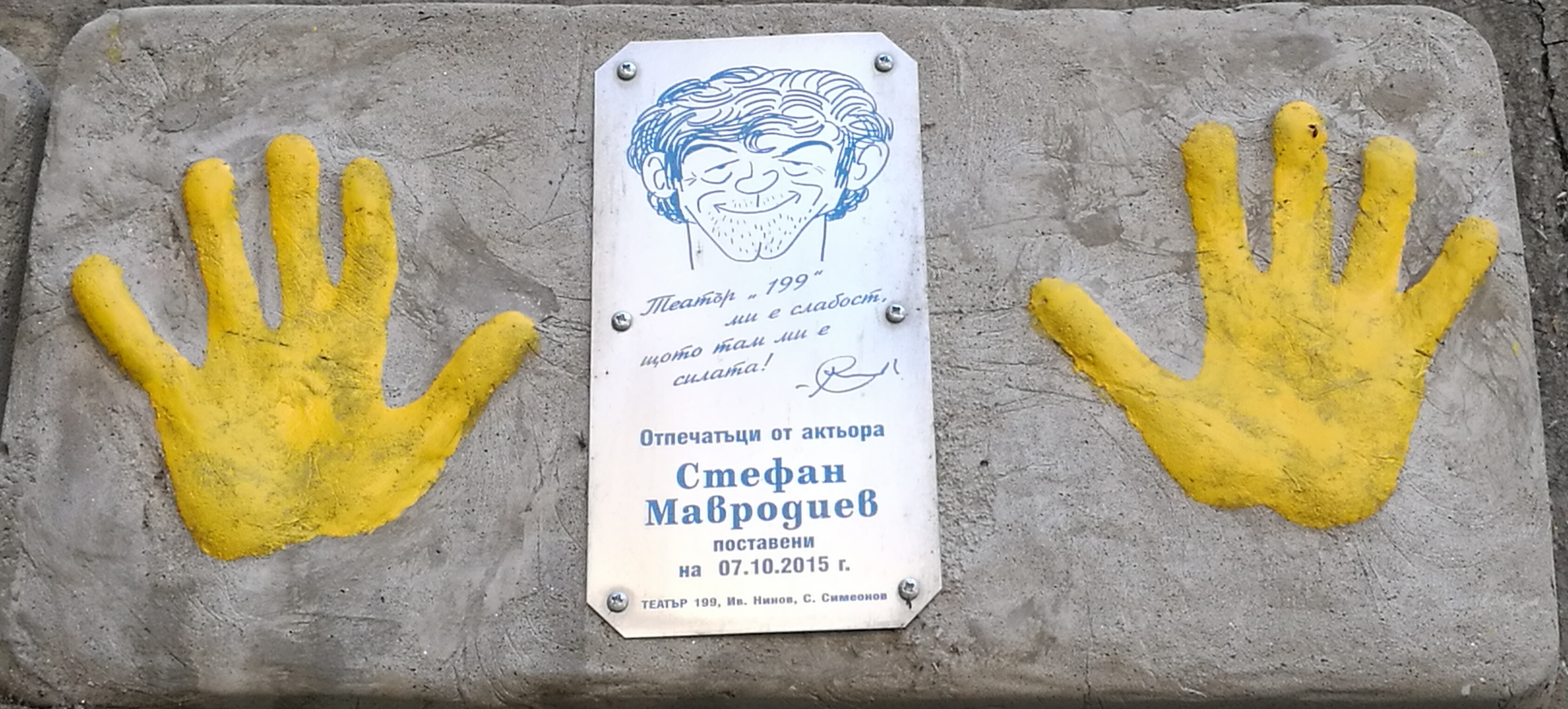 Стената на славата пред Театър 199 - пано с отпечатъци, послание и шарж на Стефан Мавродиев.